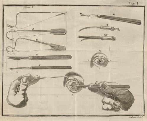 Illustratie uit Verhandelingen van het Zeeuwsch Genootschap der Wetenschappen uit 1769